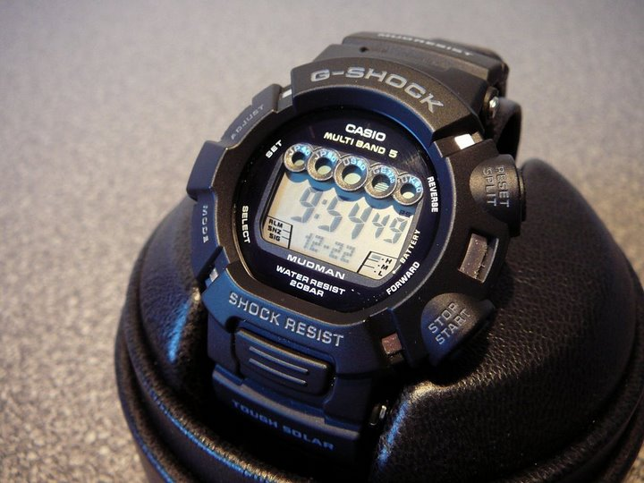 Casio G-SHOCK GW-9000